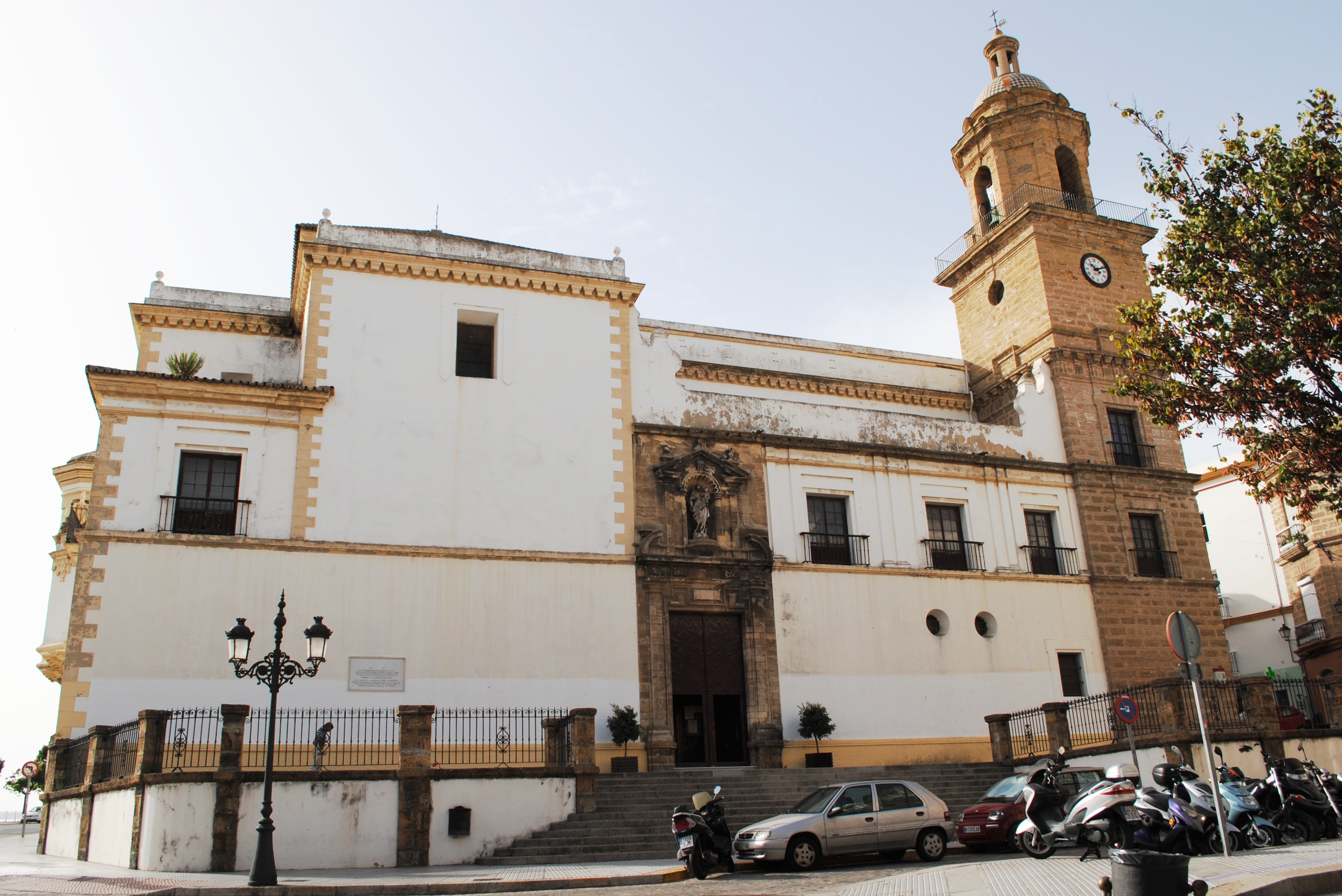 Convento de Nuestra Señora del Rosario y Santo Domingo, Cádiz. Con abundantes añadidos barrocos en su decoración, es obra de Antón Martín Calafate y Bartolomé Ruiz. Adosado a la iglesia del mismo nombre, de planta de cruz latina, jesuítica, con cubierta de bóveda de cañon en la nave central y de arista en las laterales, el crucero está cubierto por una cúpula sobre pechinas. La portada lateral, en mármol, presenta una hornacina para la Virgen del Rosario. La torre, de doble fachada, con planta cuadrangular en su base, presenta una planta octogonal en el cuerpo de campanas, que aparece cubierto por una cúpula. En la cabecera, un saliente poligonal del ábside indica el lugar del camarín de la patrona de la ciudad. Contiene interesantes retablos, el de la capilla mayor, de mármol, es del último tercio del siglo XVII, tiene en su cuerpo principal cuatro grandes columnas salomónicas de color oscuro y en su centro el camarín de la Patrona. Claustro, con cuatro pórticos de arcos sobre columnas toscanas, tiene tres plantas, en las superiores aparecen molduras y pilastras.